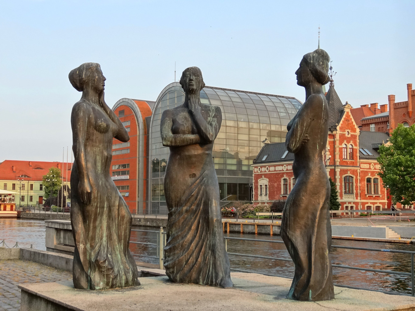 Rzeźba Jerzego Buczkowskiego "Trzy Gracje" (1989) na bulwarach nad Brdą w Bydgoszczy